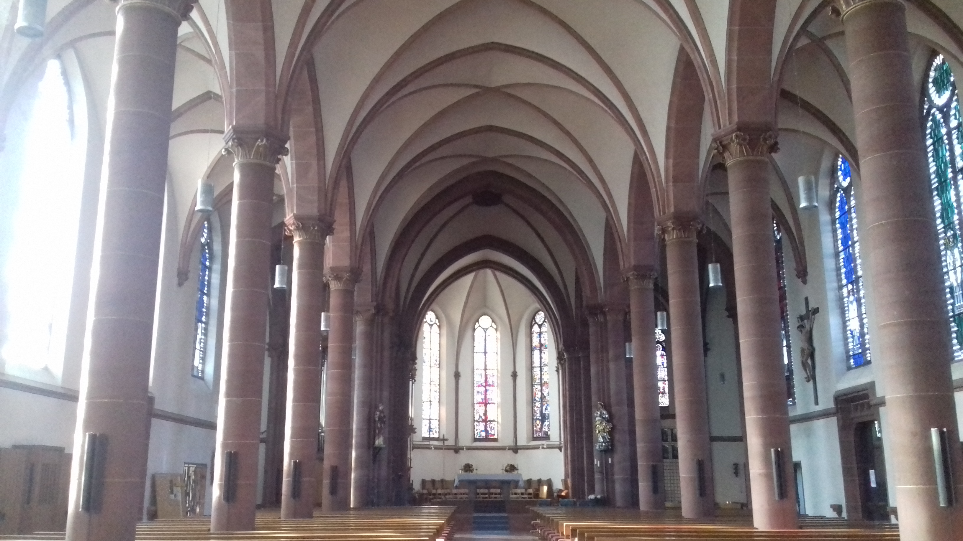 Innenansicht der Pfarrkirche St. Stephan im Mainzer Stadtteil Gonsenheim